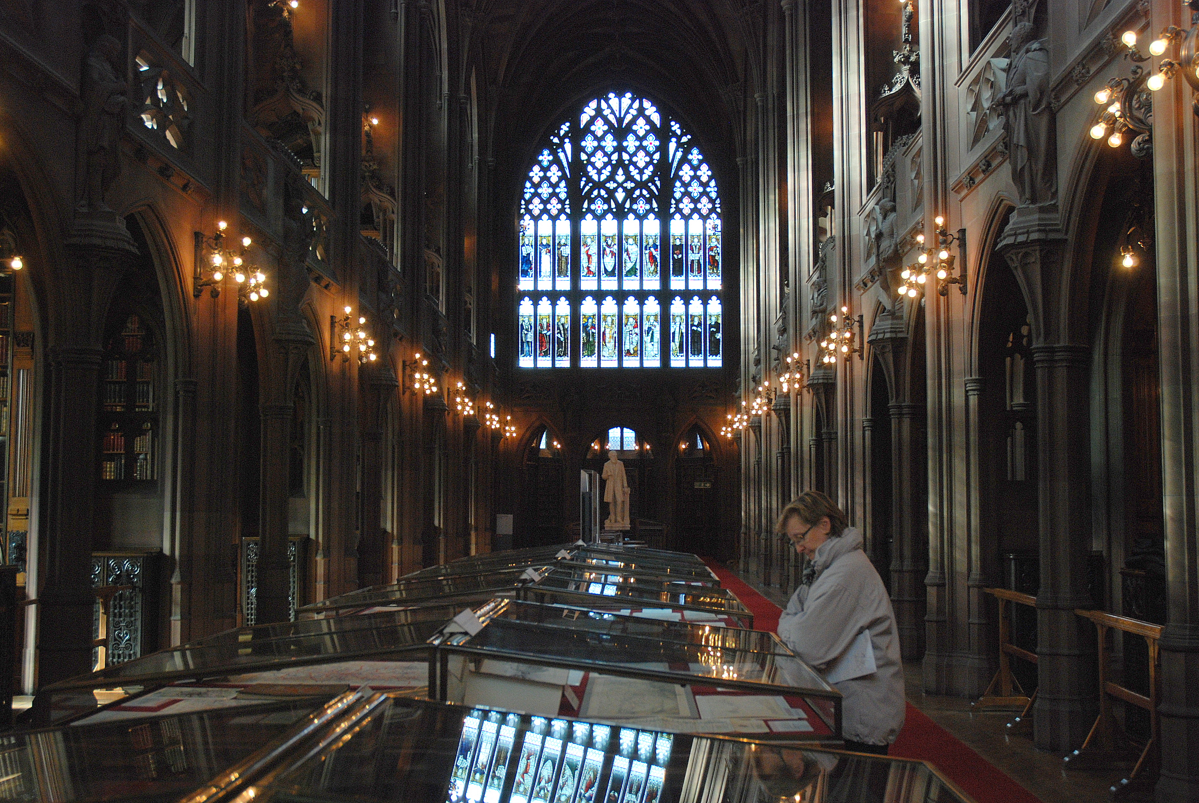 De "John Rylands Library" in Manchester, Engeland